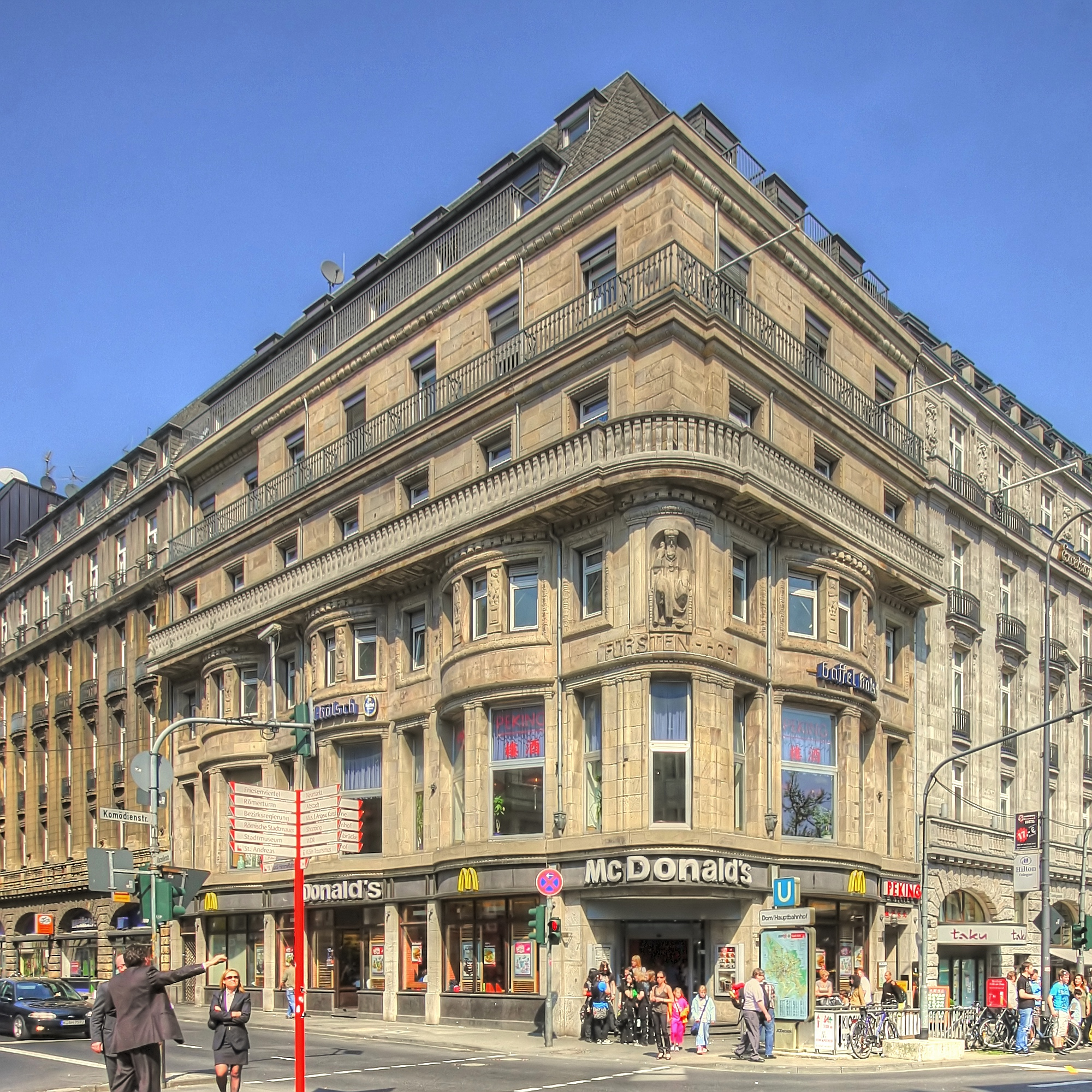 Büro- und Geschaftshaus „Fürstenhof“, Ecke Marzellenstraße 2-8/Trankgasse, Köln. Architekt: Carl Moritz, Baujahr: 1912 This is a photograph of an architectural monument.